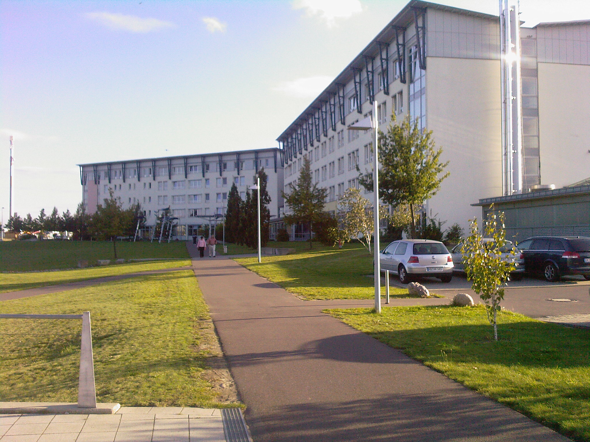 NRZ Magdeburg (Neurologisches Rehabilitationszentrum) Otto-Ricker-Strasse, Magdeburg